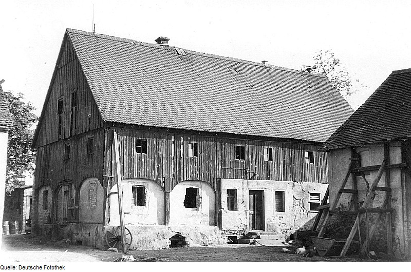 Original image description from the Deutsche Fotothek Schönau-Berzdorf auf dem Eigen-Berzdorf auf dem Eigen. Altes Haus auf dem Gut Nr. 39 zu dem die Windmühle gehörte